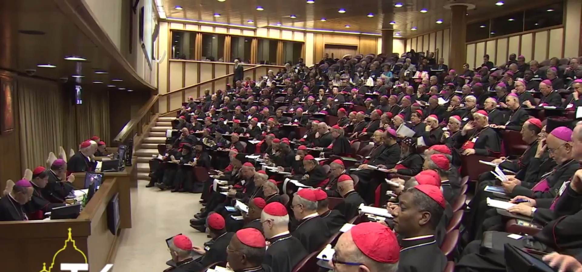 Assemblée du Synode des évêques sur les défis pastoraux de la famille dans le contexte de l'évangélisation, réunis au Vatican.